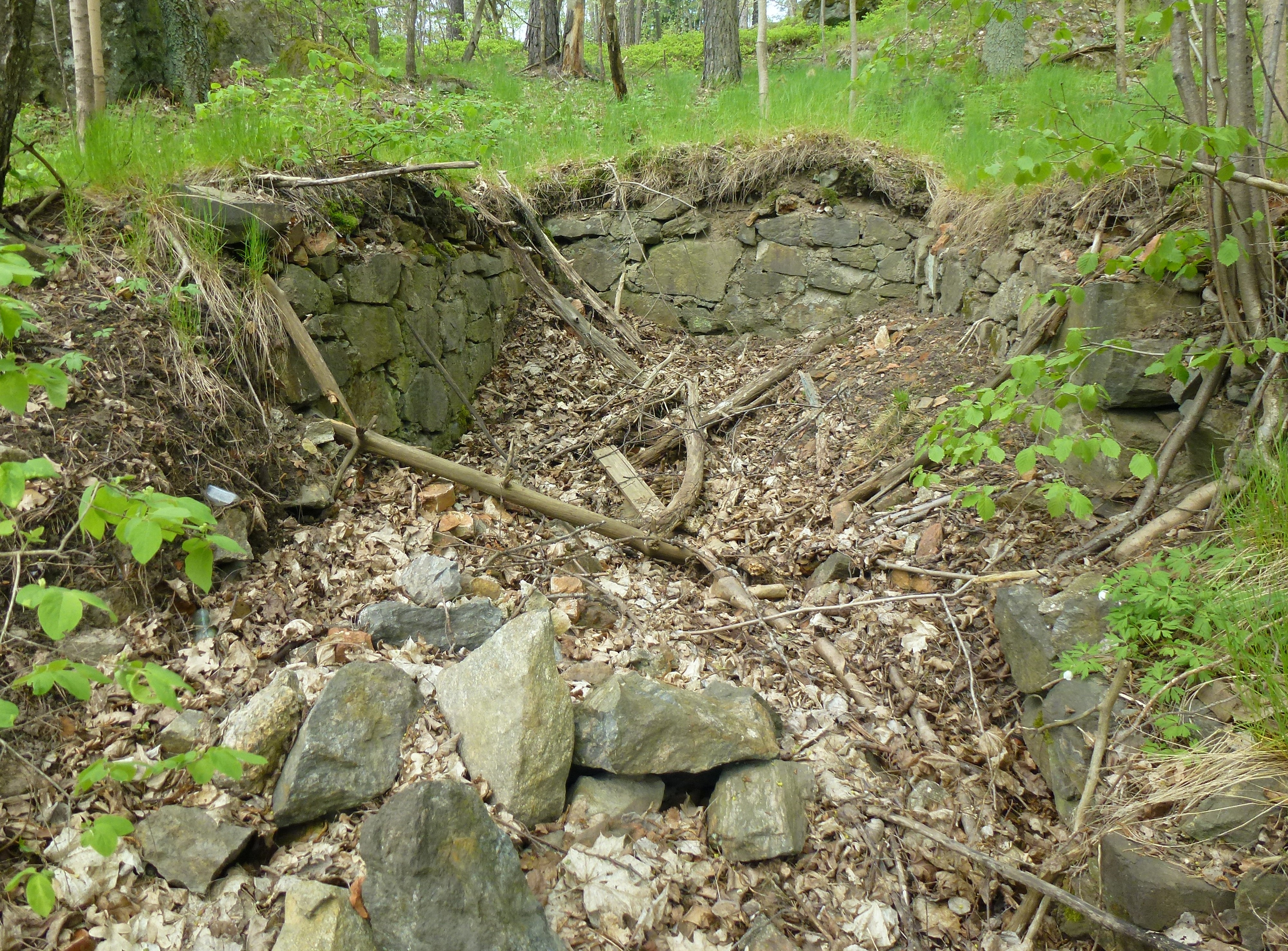 Sadelmakartorpet, , Lindvreten, rester efter jordkällar